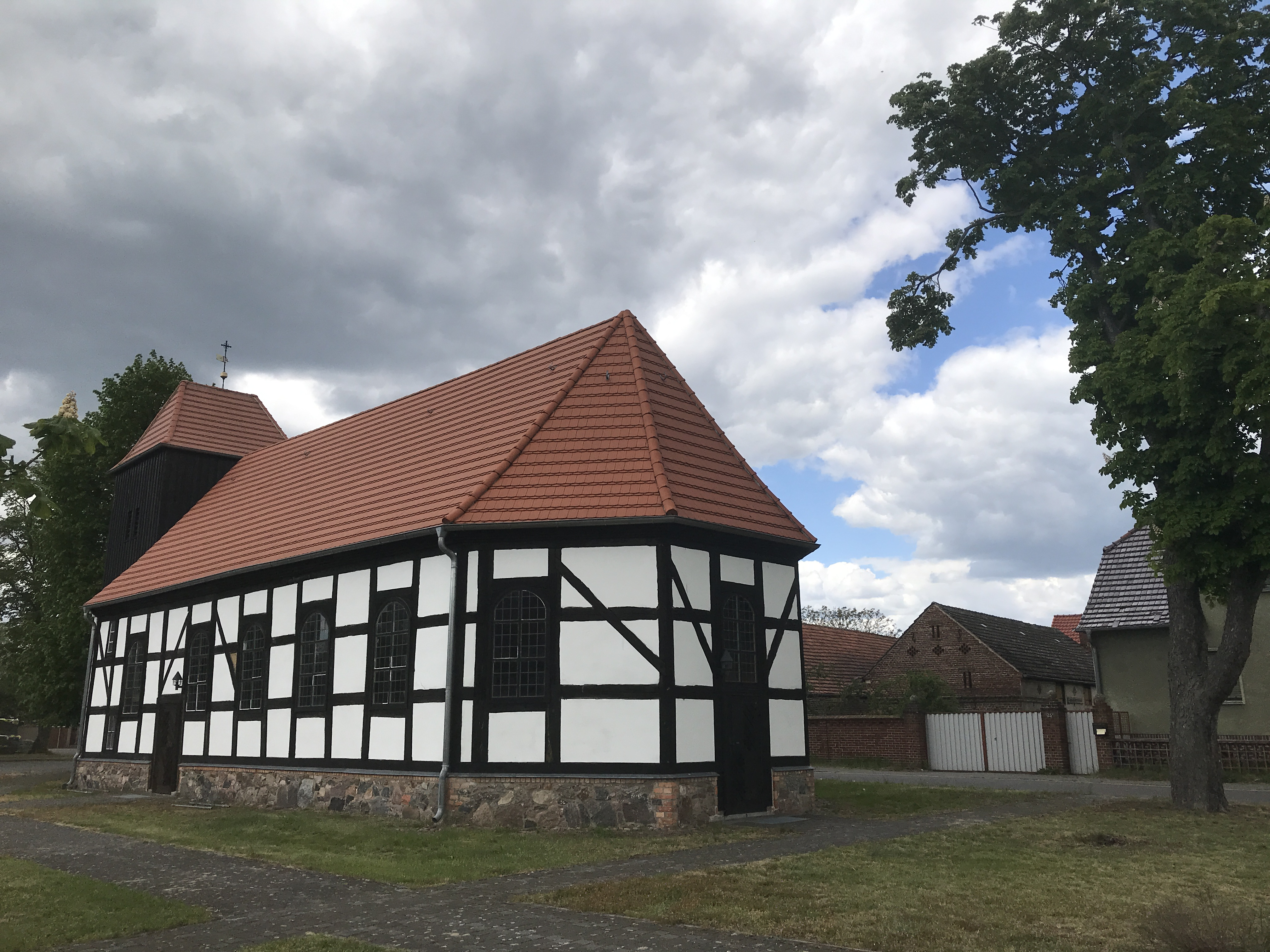 Die Dorfkirche in Rietzneuendorf der Gemeinde Rietzneuendorf-Staakow im Landkreis Dahme-Spreewald ist eine Fachwerkkirche aus dem 1704. Im Innern hängt unter anderem ein Taufengel, der der Werkstatt von Tobias Mathias Beyermann zugeschrieben wird.